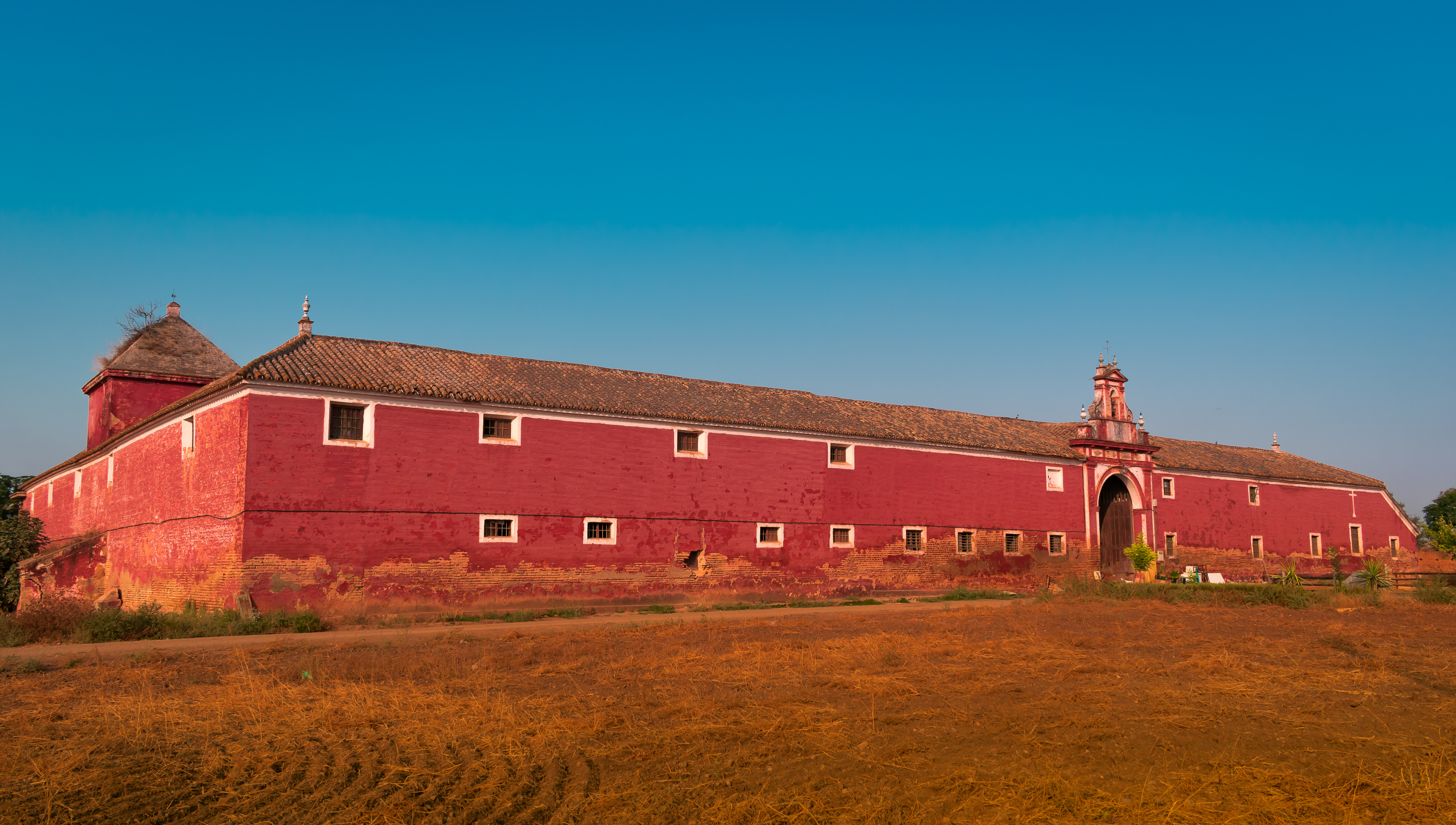 Caserío de la Hacienda Ibarburu